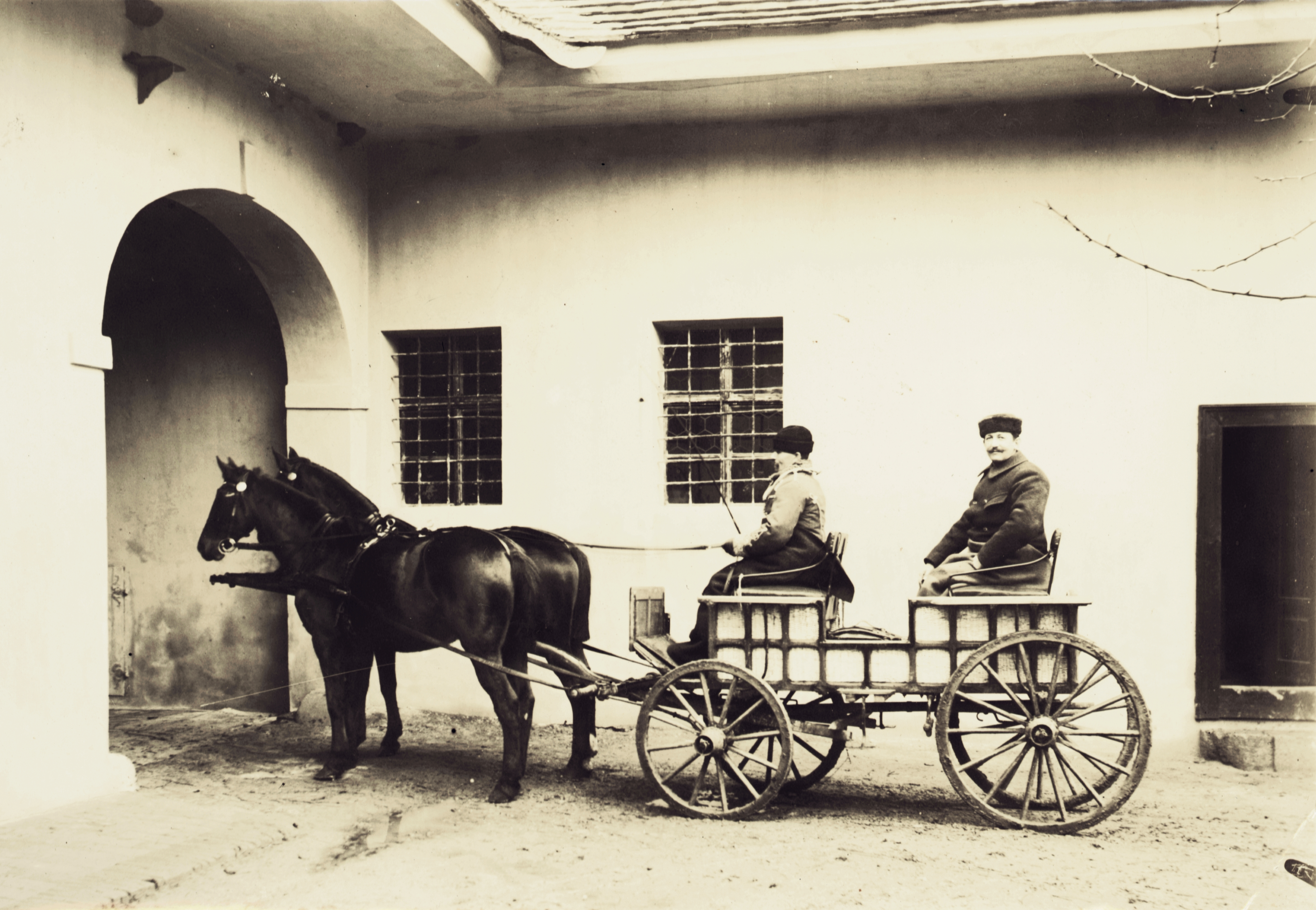 báró Mednyánszky Imre fogata. Location: Slovakia, Beckov Tags: chariot, yard, horse, coach Title: báró Mednyánszky Imre fogata.